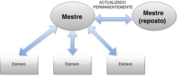 mestre escravo redundante